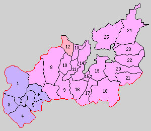 京都府加佐郡の町村制時点の町村。